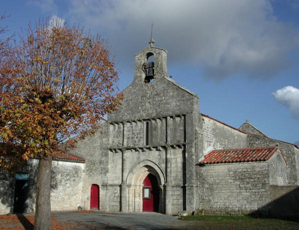 Église romane St Laurent de Forges d'Aunis